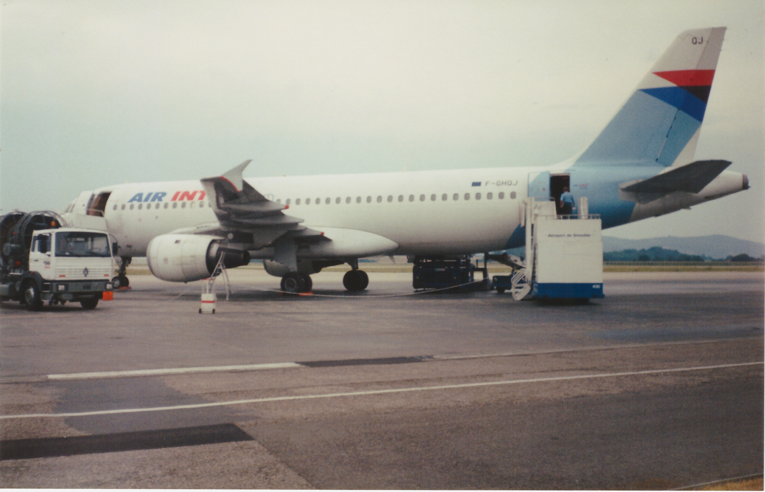 Un Airbus A320-211 (F-GHQJ) de la compagnie Air Inter sur le tarmac de l'aéroport de Grenoble-Saint-Geoirs en aout 1993